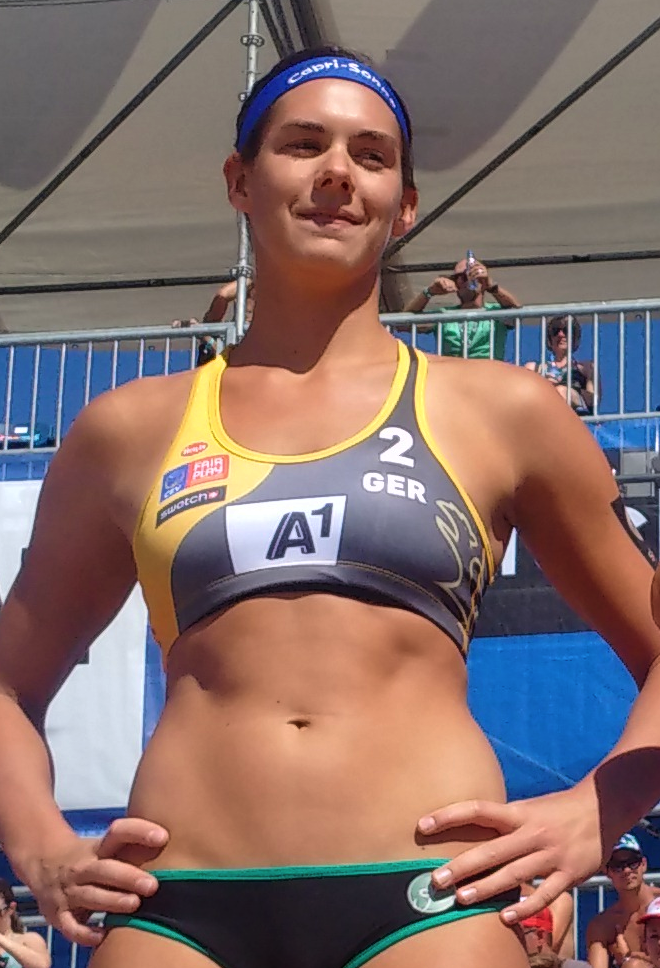 Kira Walkenhorst in Klagenfurt 2015 vorm Halbfinale